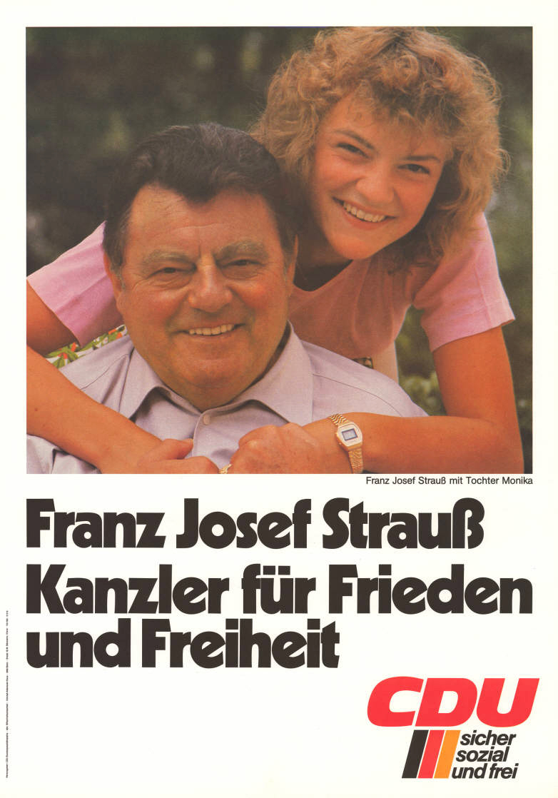 Franz Josef Strauß mit Tochter Monika, Franz Josef Strauß Kanzler für Frieden und Freiheit CDU sicher sozial und frei Abbildung: Strauß mit Tochter Monika Plakatart: Kandidaten-/Personenplakat mit Porträt Auftraggeber: CDU-Bundesgeschäftsstelle, Abt. Öffentlichkeitsarbeit, Konrad-Adenauer-Haus, Bonn Drucker_Druckart_Druckort: G.W. Bösmann, Kleve Objekt-Signatur: 10-001: 2204 Bestand: Plakate zu Bundestagswahlen (10-001) GliederungBestand10-18: Plakate zu Bundestagswahlen (10-001) » Die 9. Bundestagswahl am 5. Oktober 1980 » CDU » Mit Porträtfoto Lizenz: KAS/ACDP 10-001: 2204 CC-BY-SA 3.0 DE